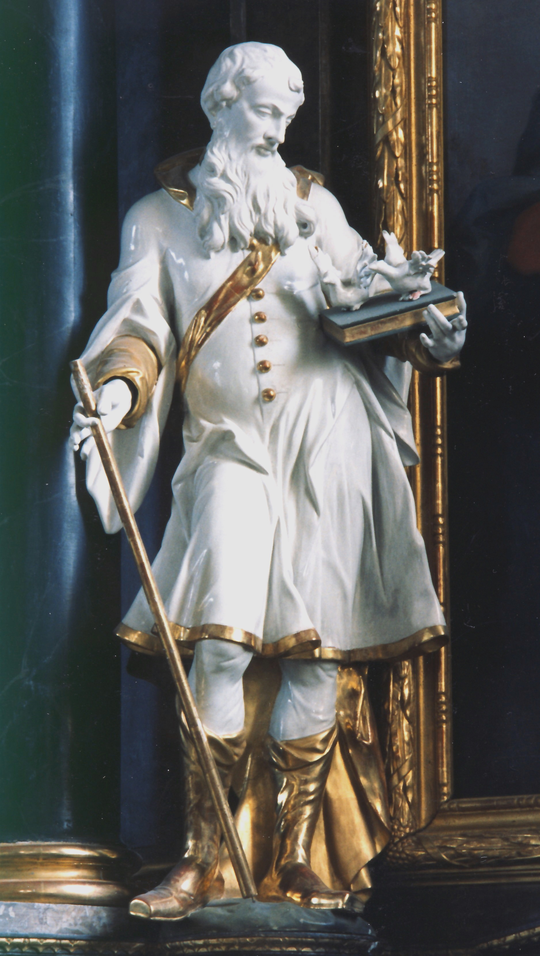 Johann Sigmund Hitzelberger (1745-1829), Hl. Joachim, Pfarrkirche Pfronten, Ostallgäu